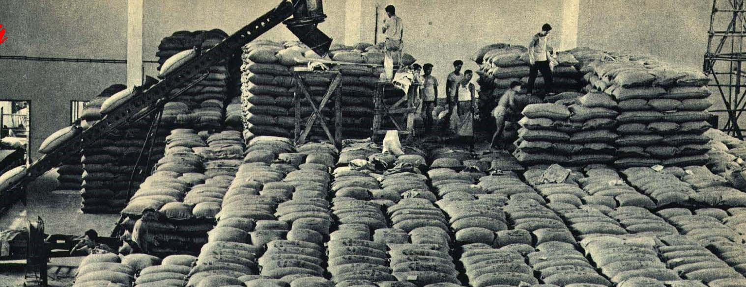 1962-07 1962年 甘蔗制糖厂